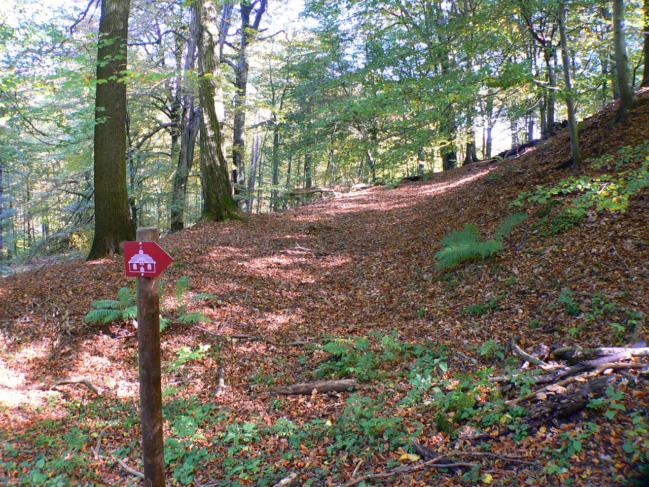 Ahlberg (Reinhardswald, Hessen), keltischer Wall und Graben, EcoPfad Archäologie Ahlberg-Mariendorf